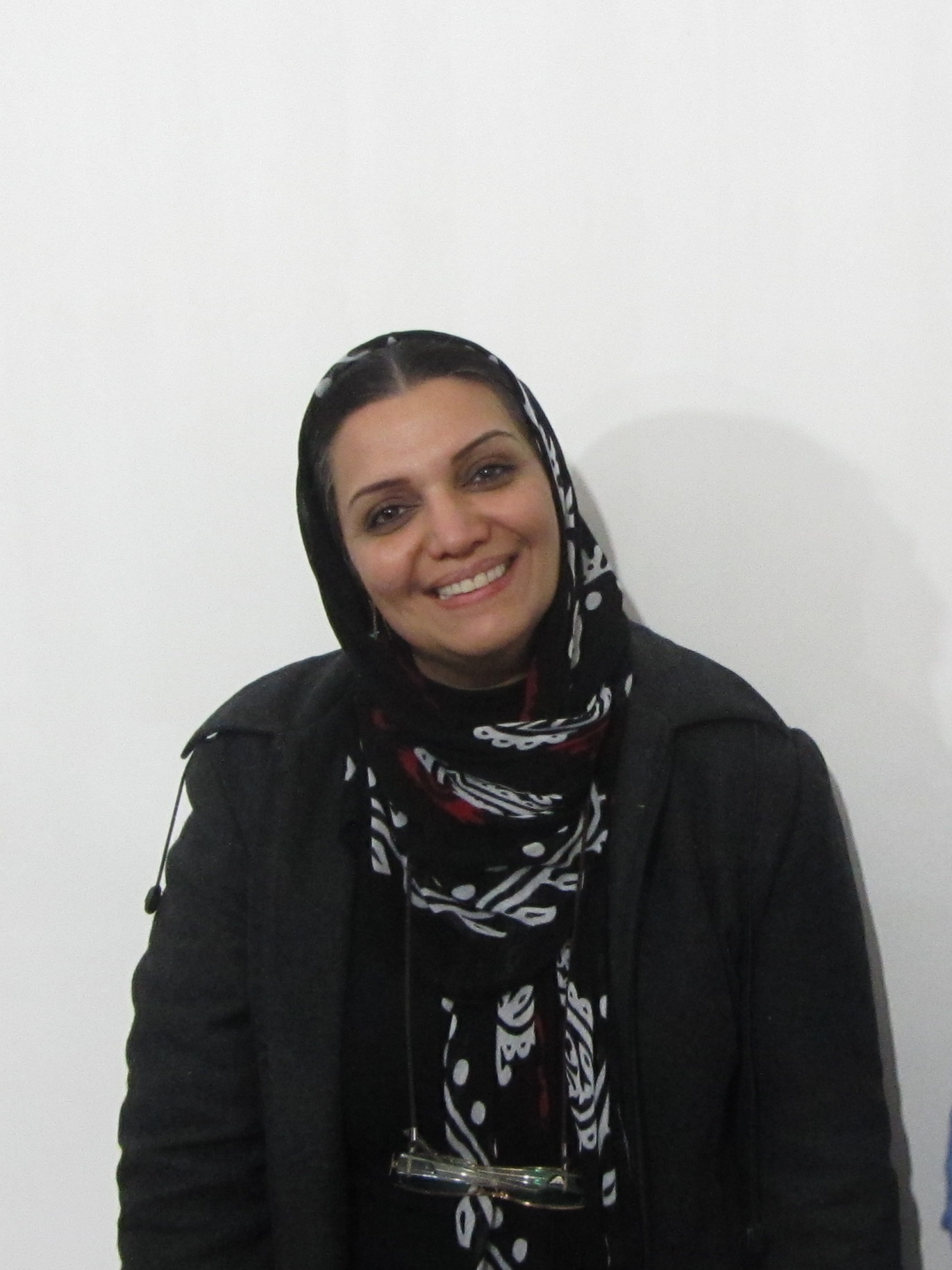 الهام پاوه‌نژاد